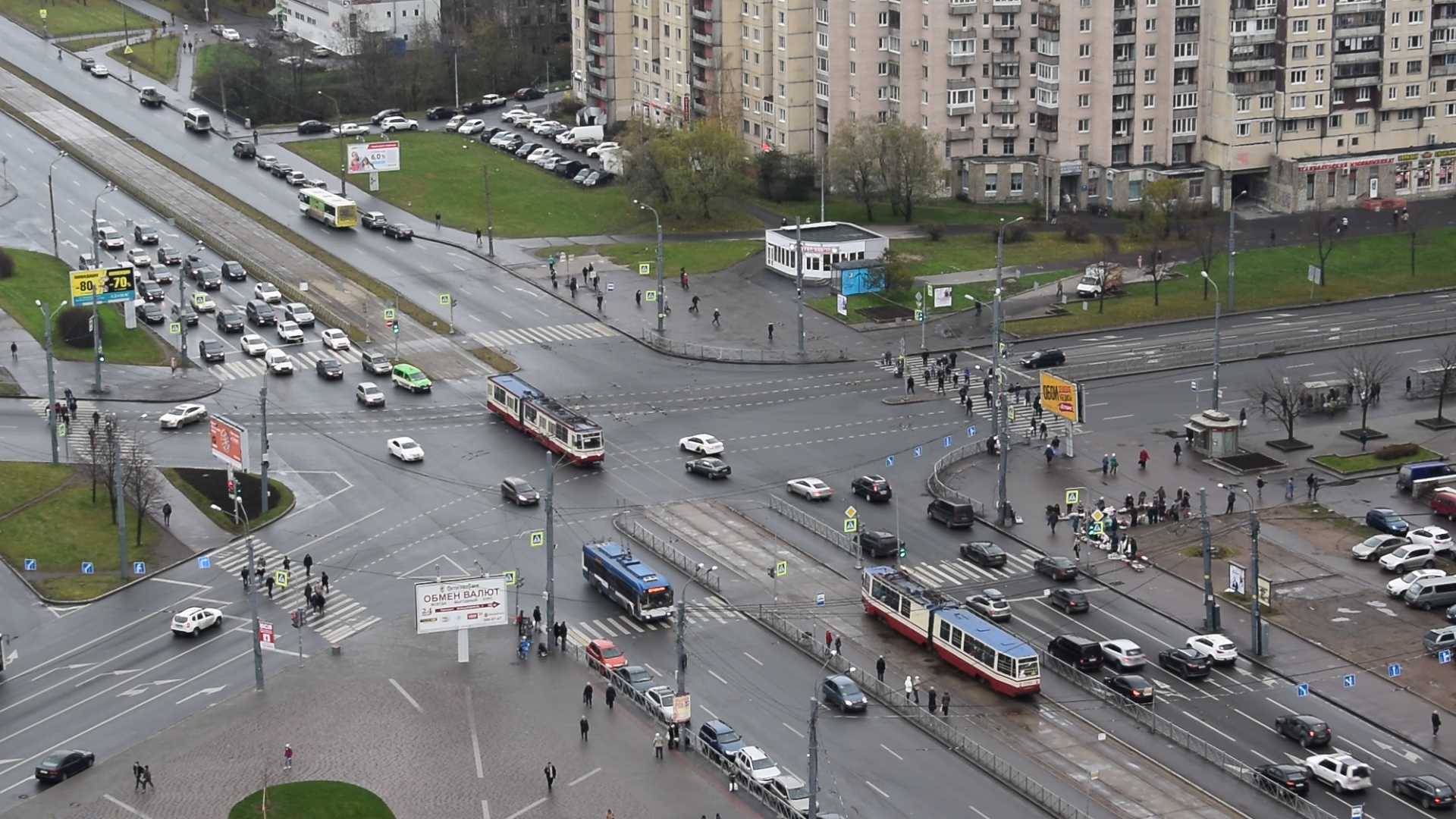 Перекрёсток Большевиков, Российского и Коллонтай